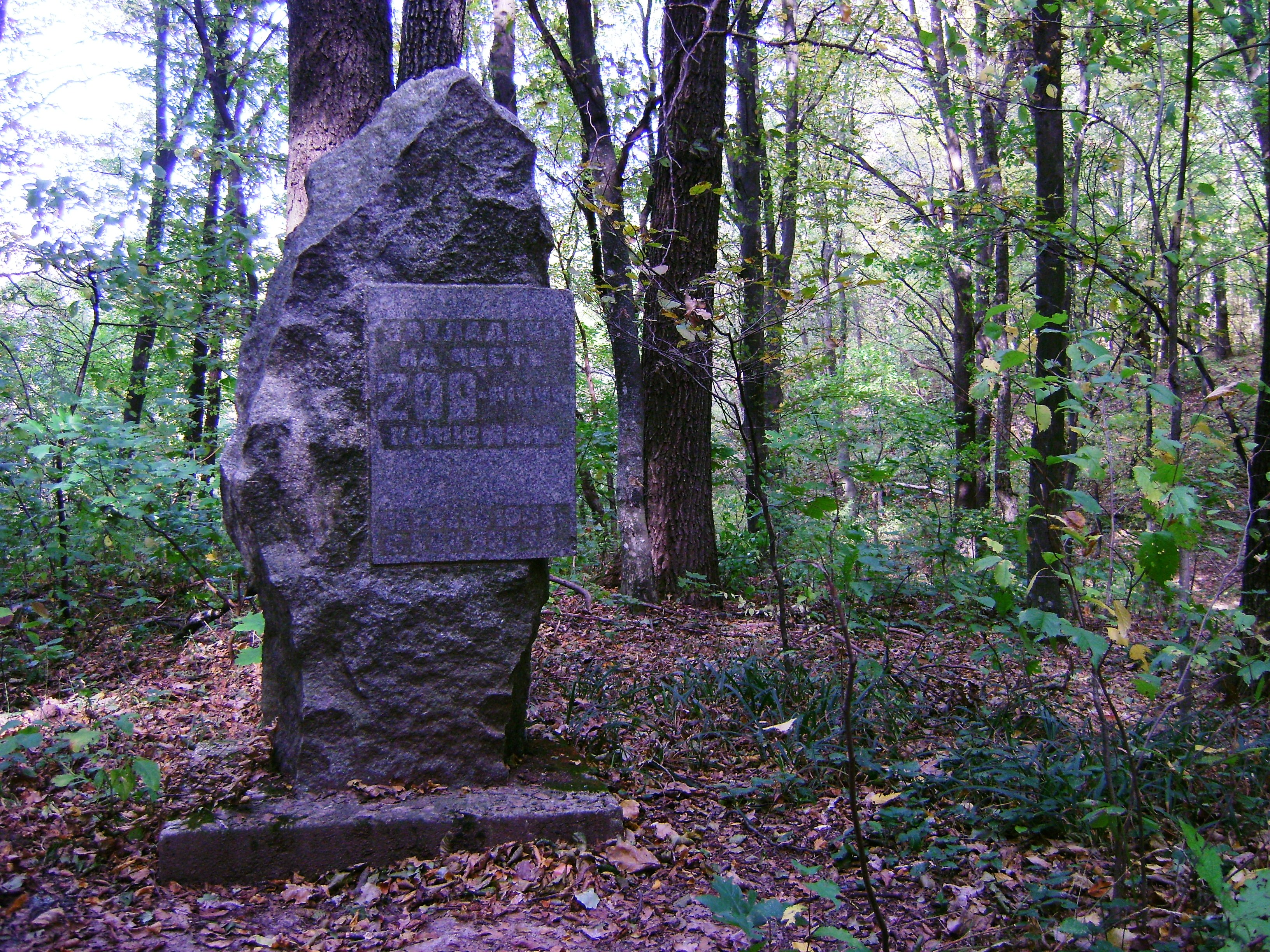 Пам'ятний знак на честь 200-річчя Коліївщини, Новоархангельський район, С.Кам'янече, Кам'янецька с/рада, околиця